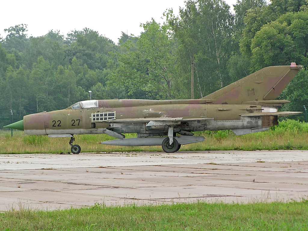 MiG-21SPS der Flugwelt Altenburg-Nobitz e.V. Comment: I believe this is MiG-21PFM Pibwl 23:04, 3 February 2008 (UTC) Quelle: selbst fotografiert - Juli 2005 Fotograf: Philipp Tropschug Lizenzstatus: GNU FDL